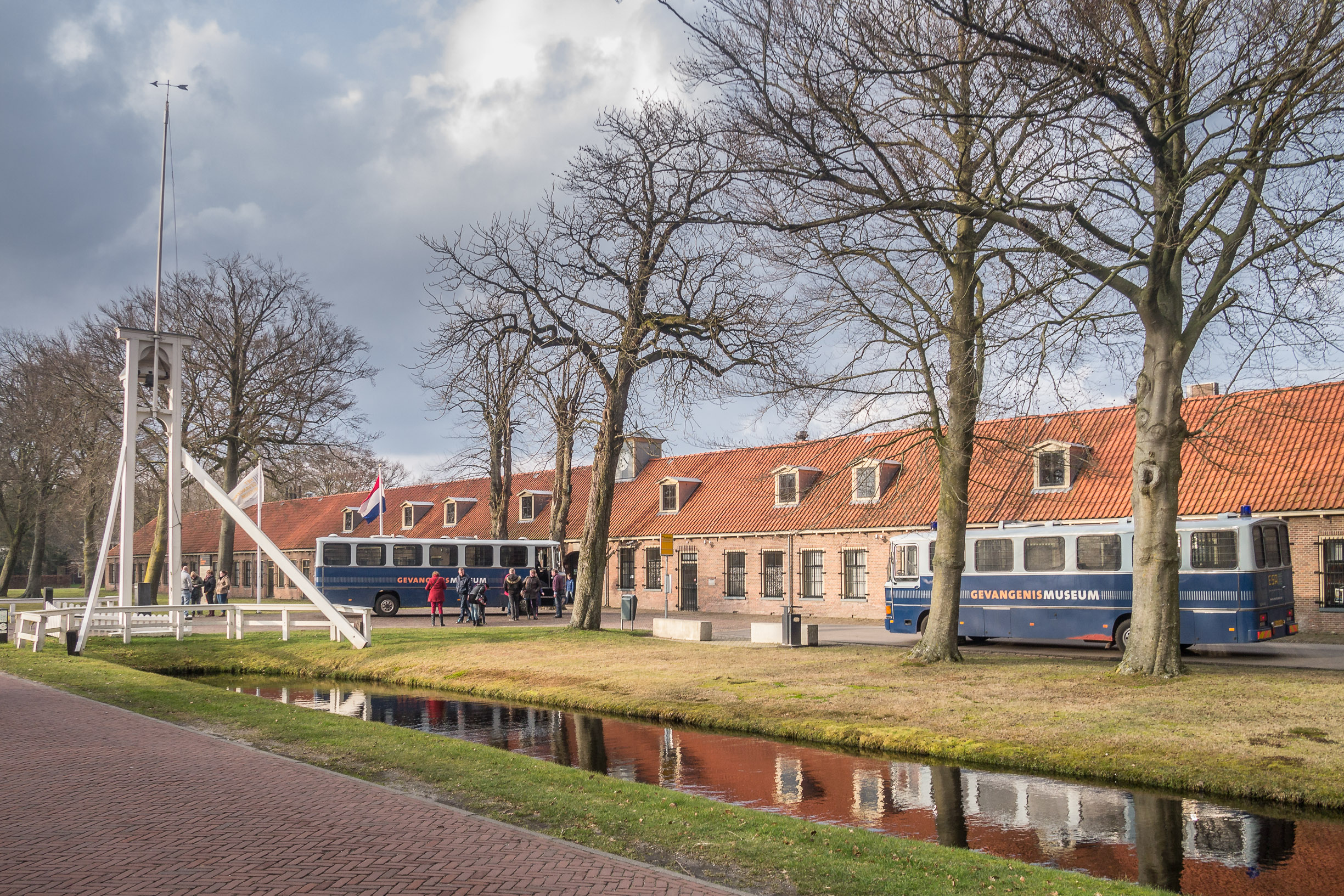 Tweede kolonie Veenhuizen, later gevangenis nu museum.